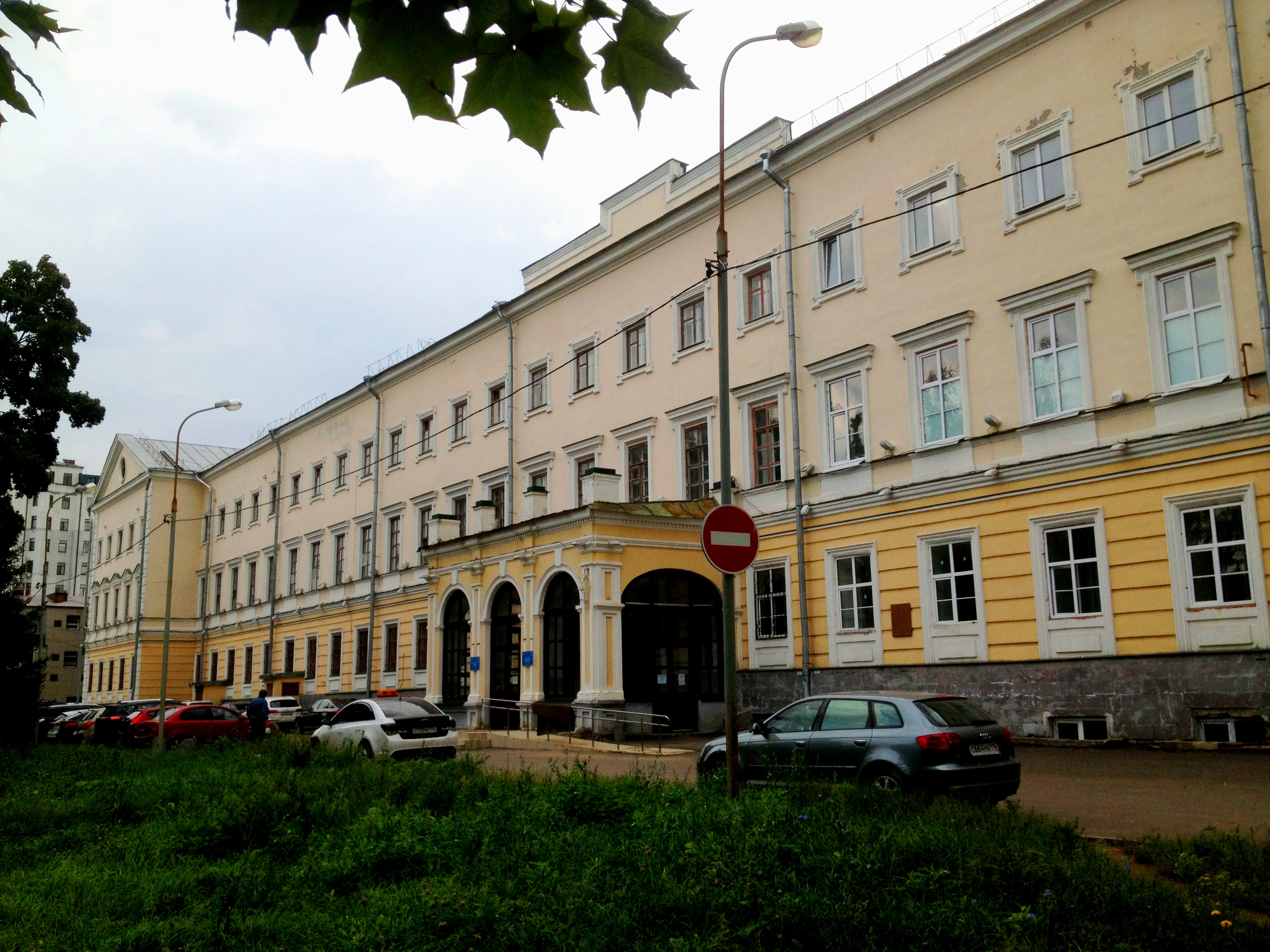 Здание казанской духовной академии: улица Н. Ершова, 2, Казань, Татарстан